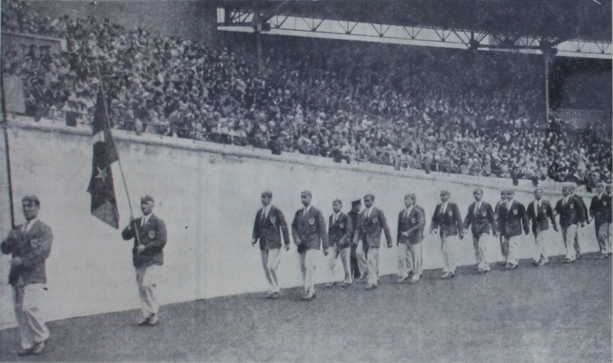 1928 Yaz Olimpiyatları açılış töreninde Türkiye kafilesi.